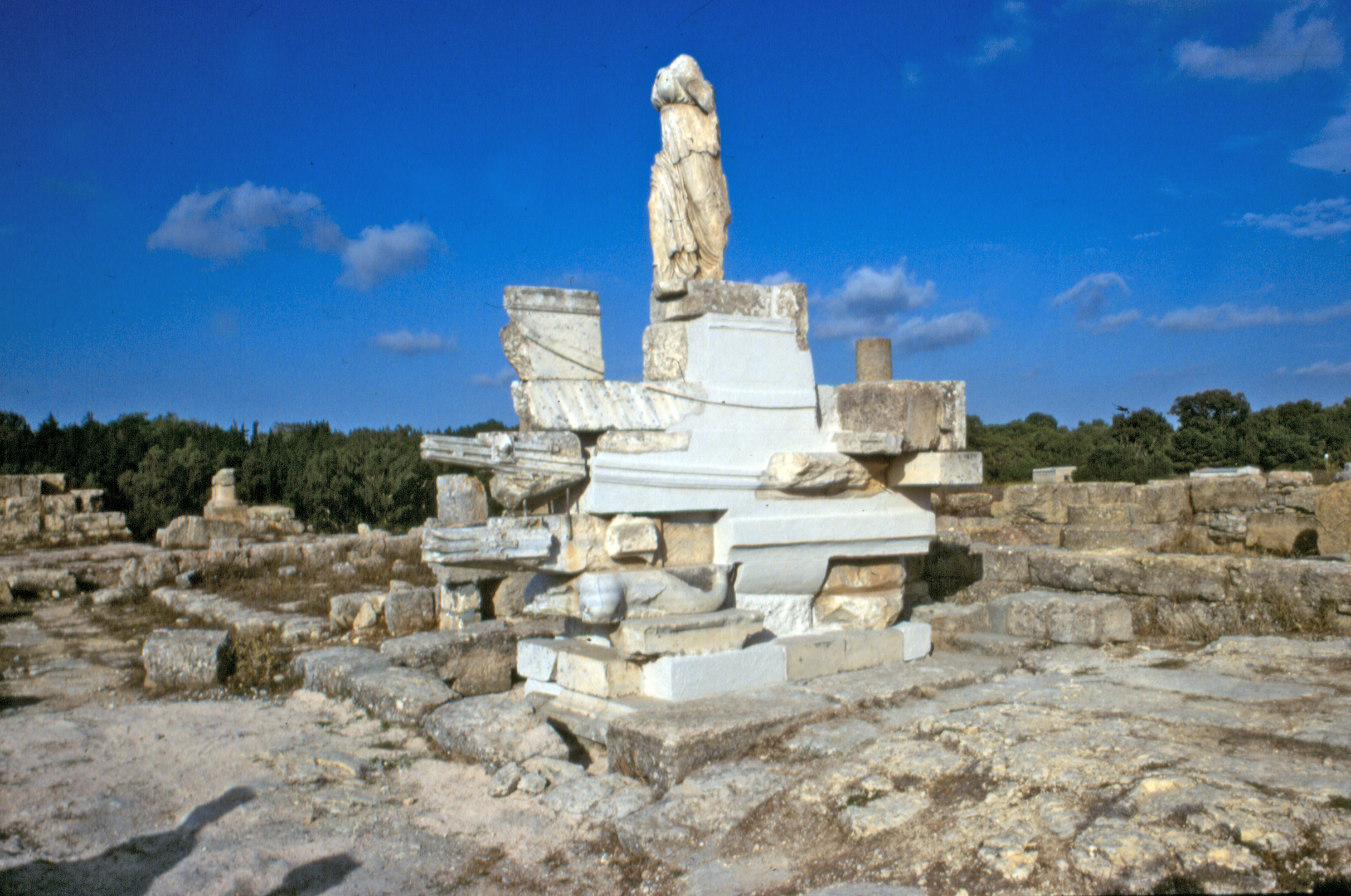 Libia, Cirene (sito archeologico), agorà, monumento della Vittoria Navale